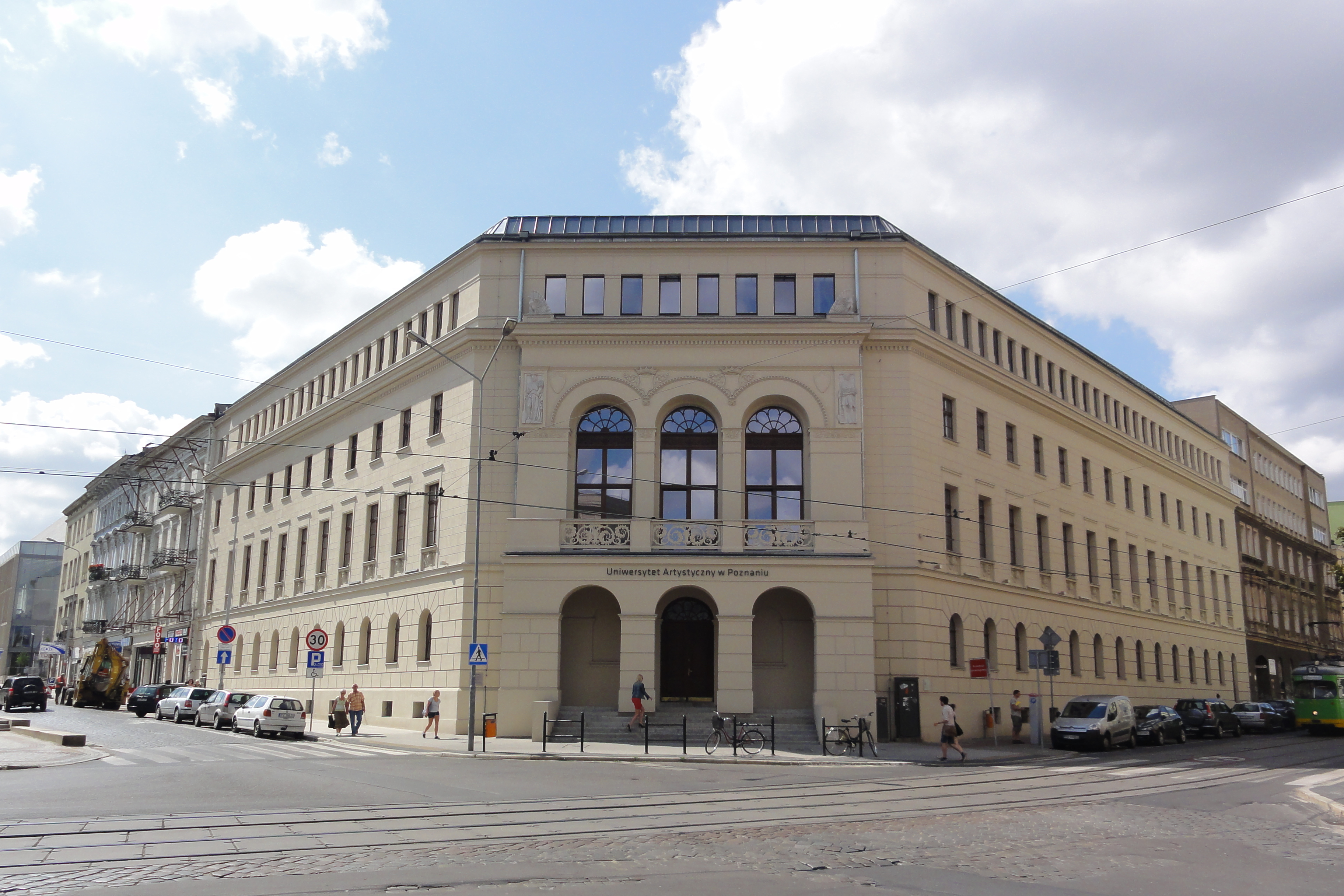 Akademia Sztuk Pięknych w Poznaniu